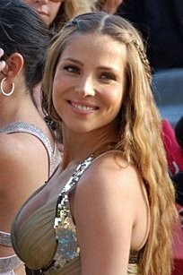 Elsa Pataky au Festival de Cannes.